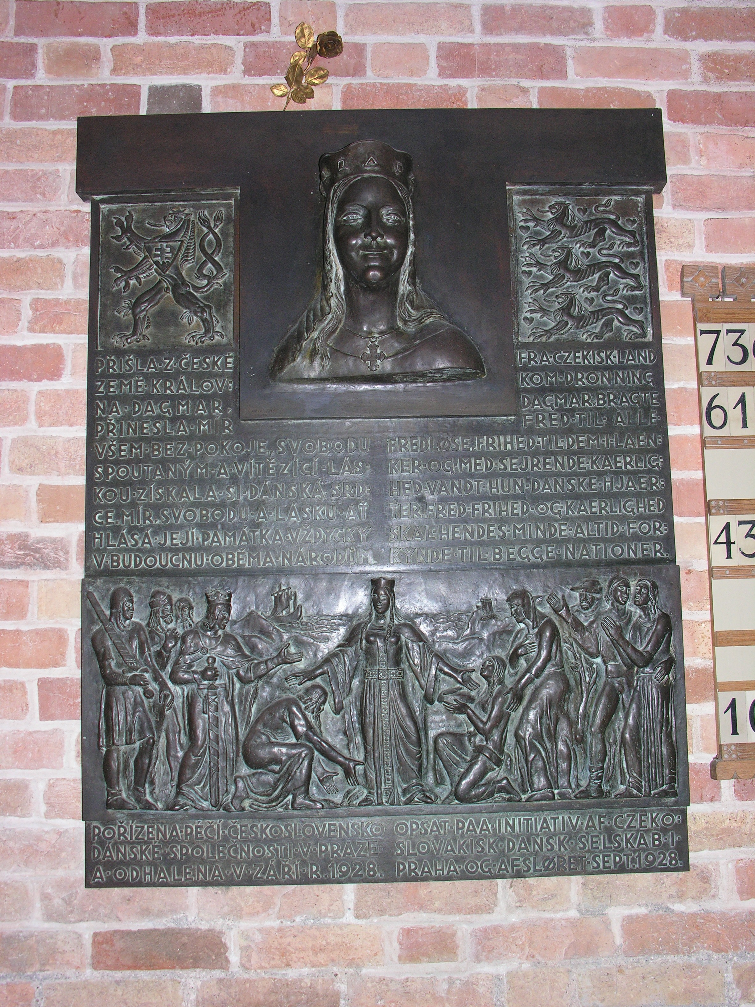 Ringsted. Tablica ku czci królowej Dagmar